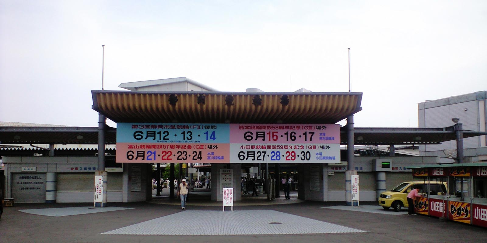 静岡市小鹿2丁目、静岡競輪場正面入場口